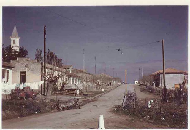 Ancien village de Gastu, actuelle commune de Bekkouche Lakhdar (Skikda, Algérie).